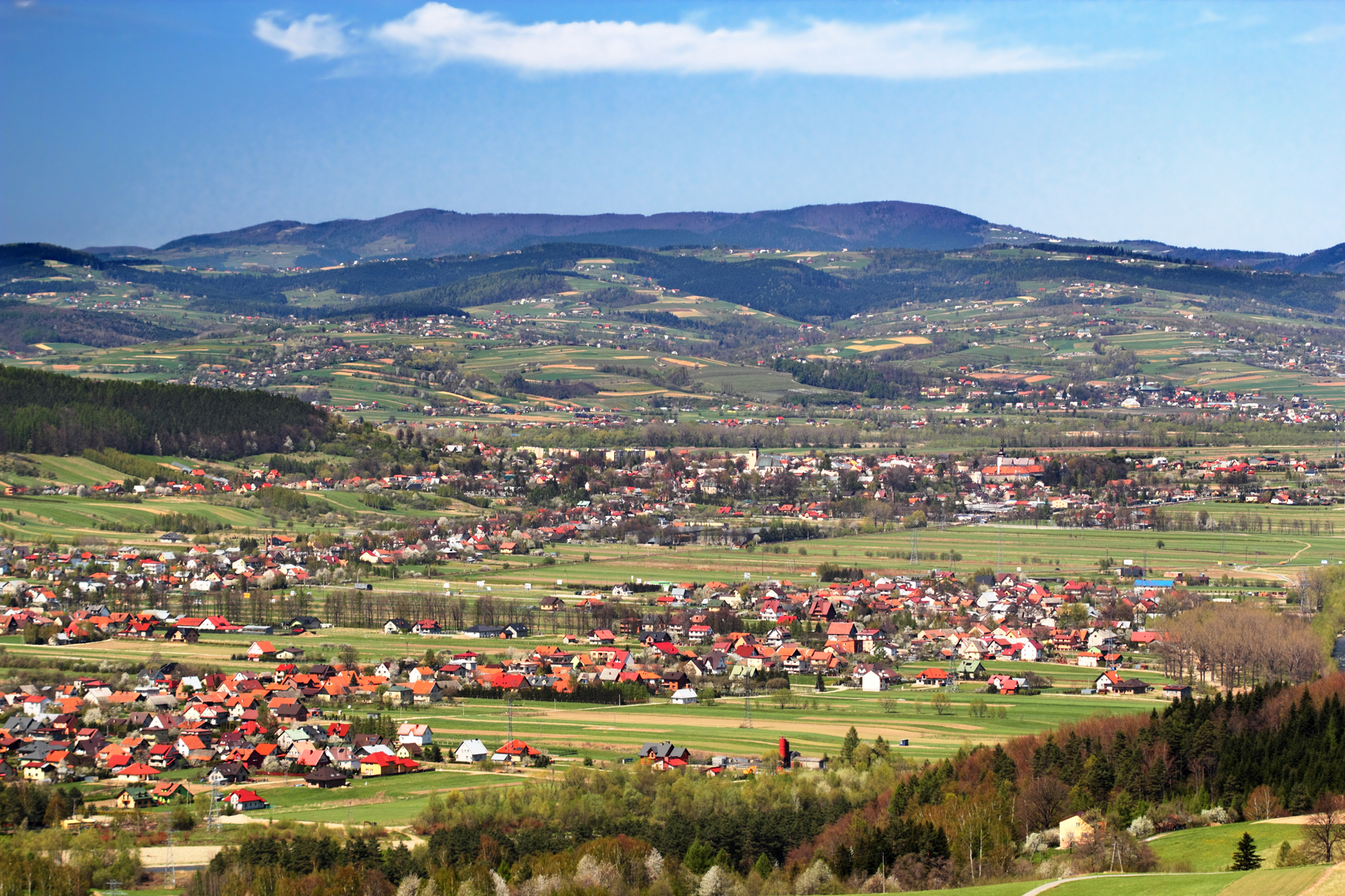 Założenie urbanistyczne miasta Stary Sącz, Stary Sącz rej. nr 519.